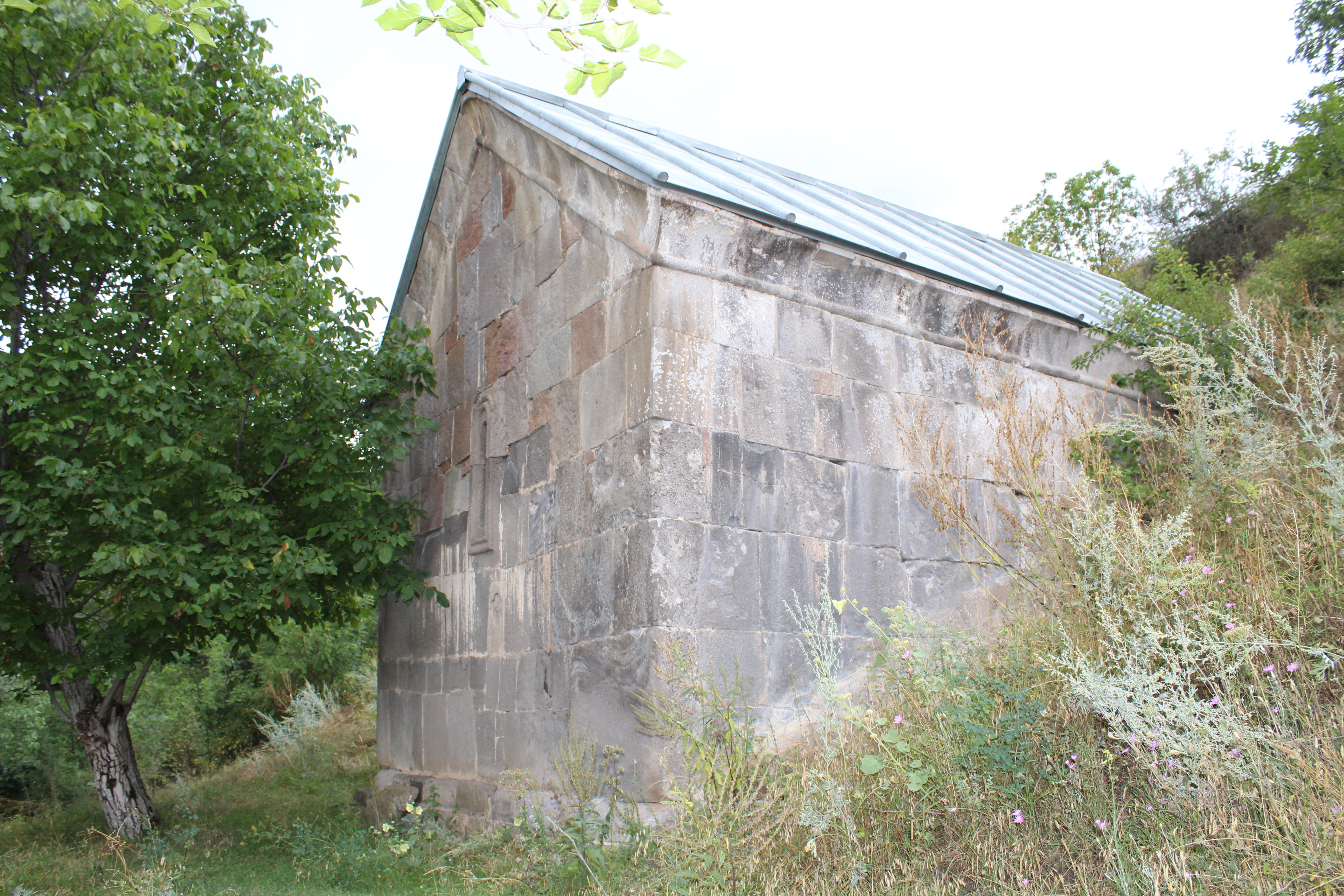 წყორძის დარბაზული ეკლესია